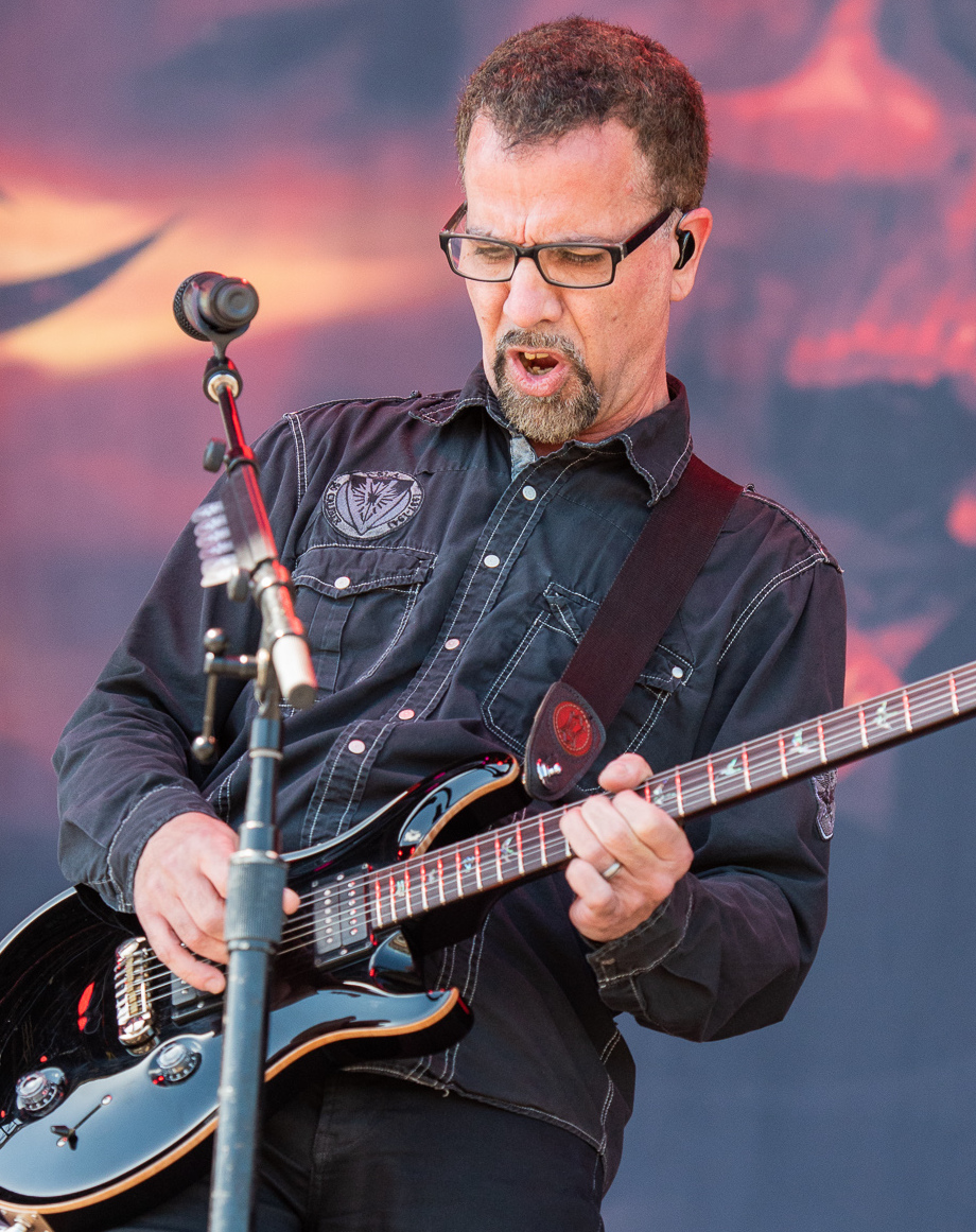 ARGO-Konzerte,Godsmack,Konzert,Livekonzert,Livemusik,Musik,RiP,Rock im Park 2019,Tony Rombola,Zeppelin Stage